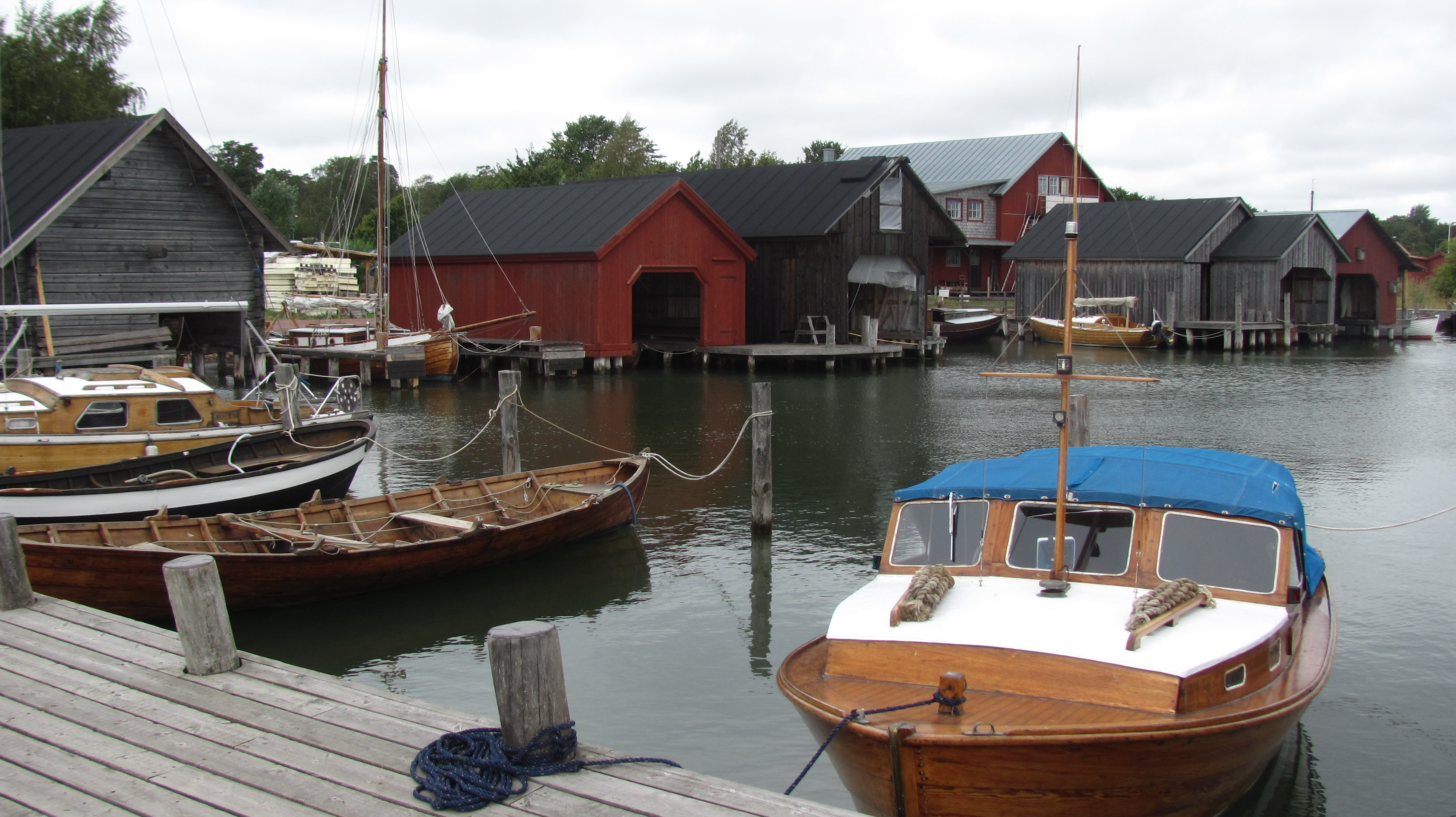 Seefahrerviertel, Mariehamn, Fasta Aland, Finnland